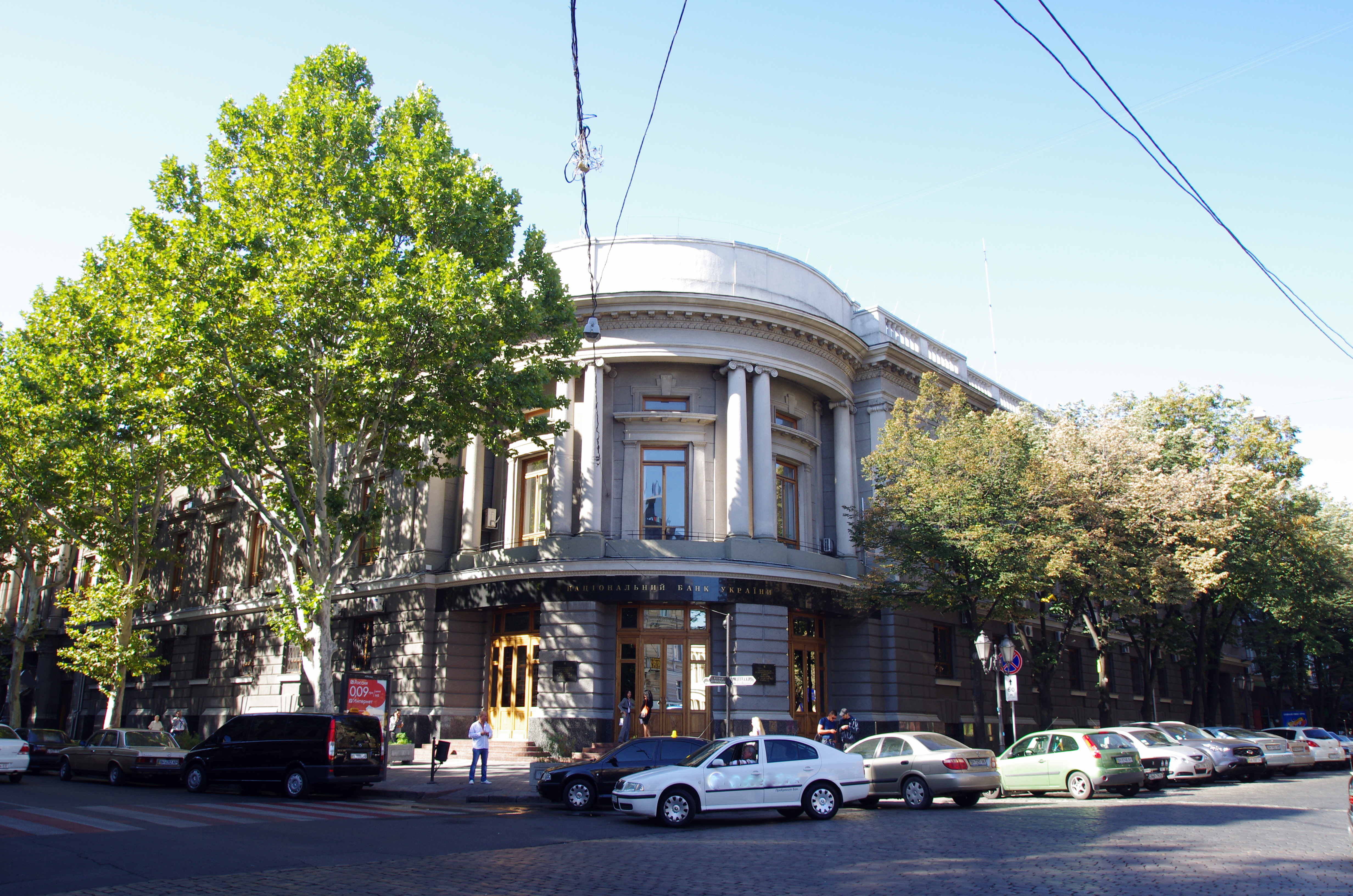 Будівля Державного банку